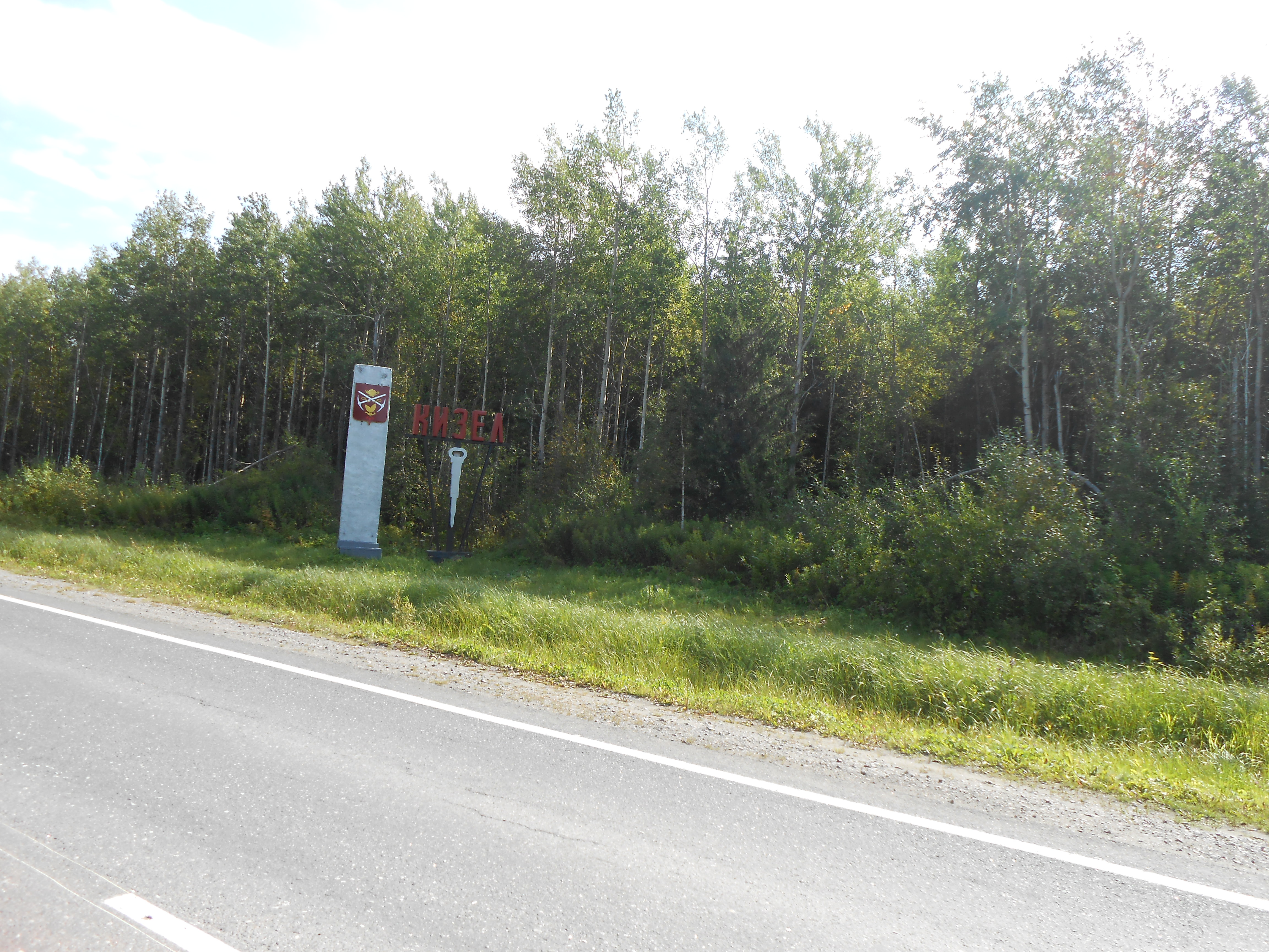 Стела при въезде в Кизел со стороны Губахи